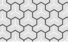 CG